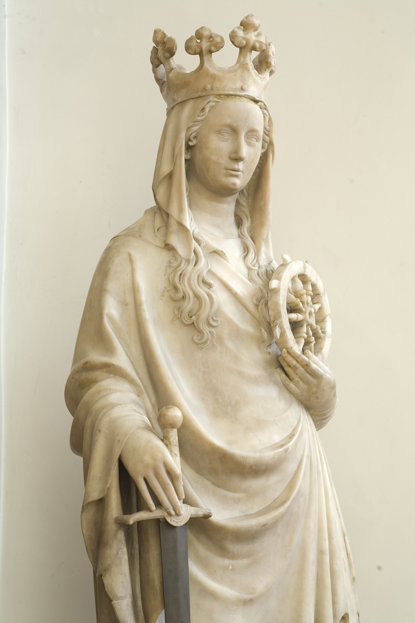 Hl. Catharina, André Beauneveu 1380